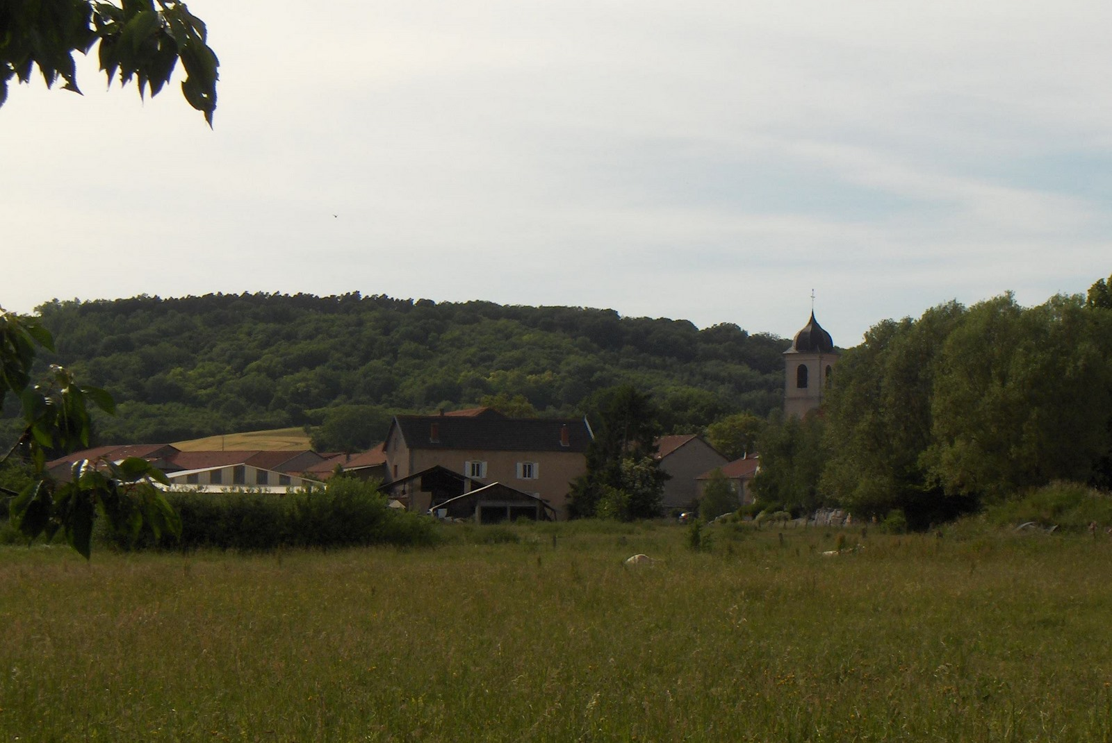 Vaxy, Gemeinde im Departement Moselle, Frankreich (Dorfanblick)